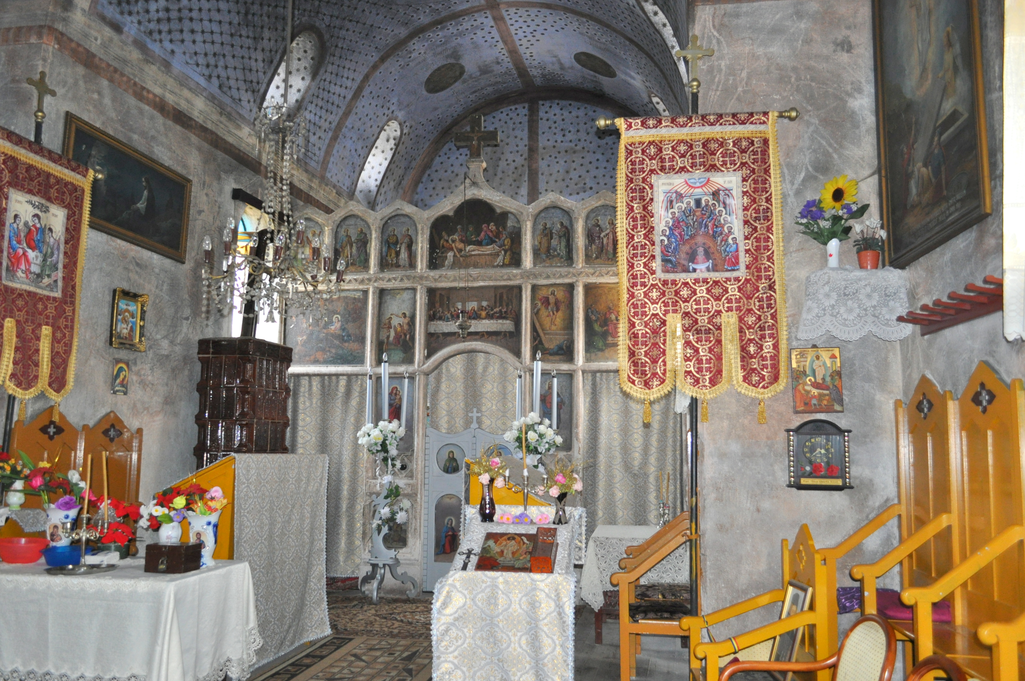 Biserica „Sfântul Prooroc Ilie”, sat Peșteana; comuna Densuș